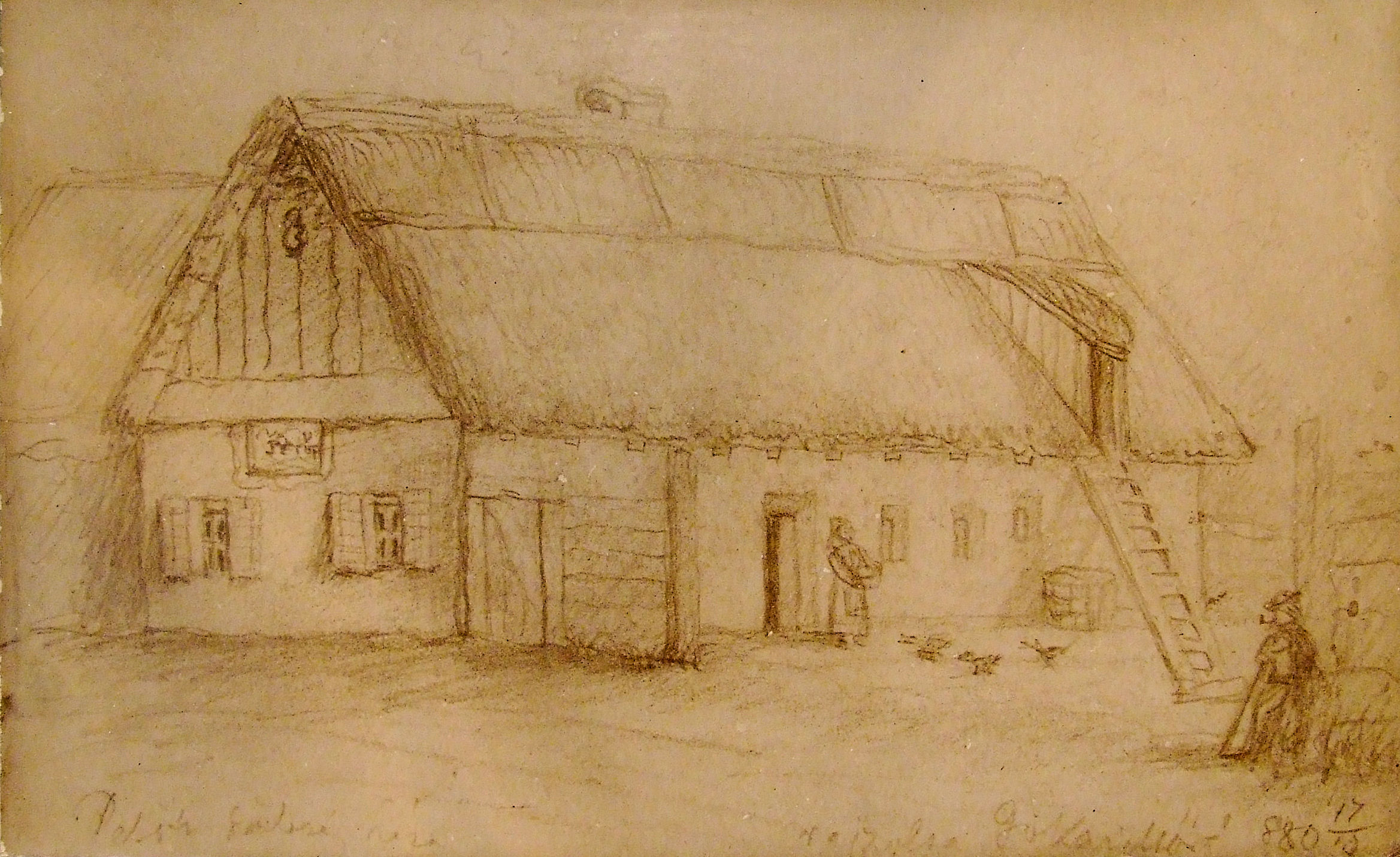 Petőfi Sándor szülőháza. Jókai Mór rajza (1880). Petőfi Szülőház és Emlékmúzeum, Kiskőrös